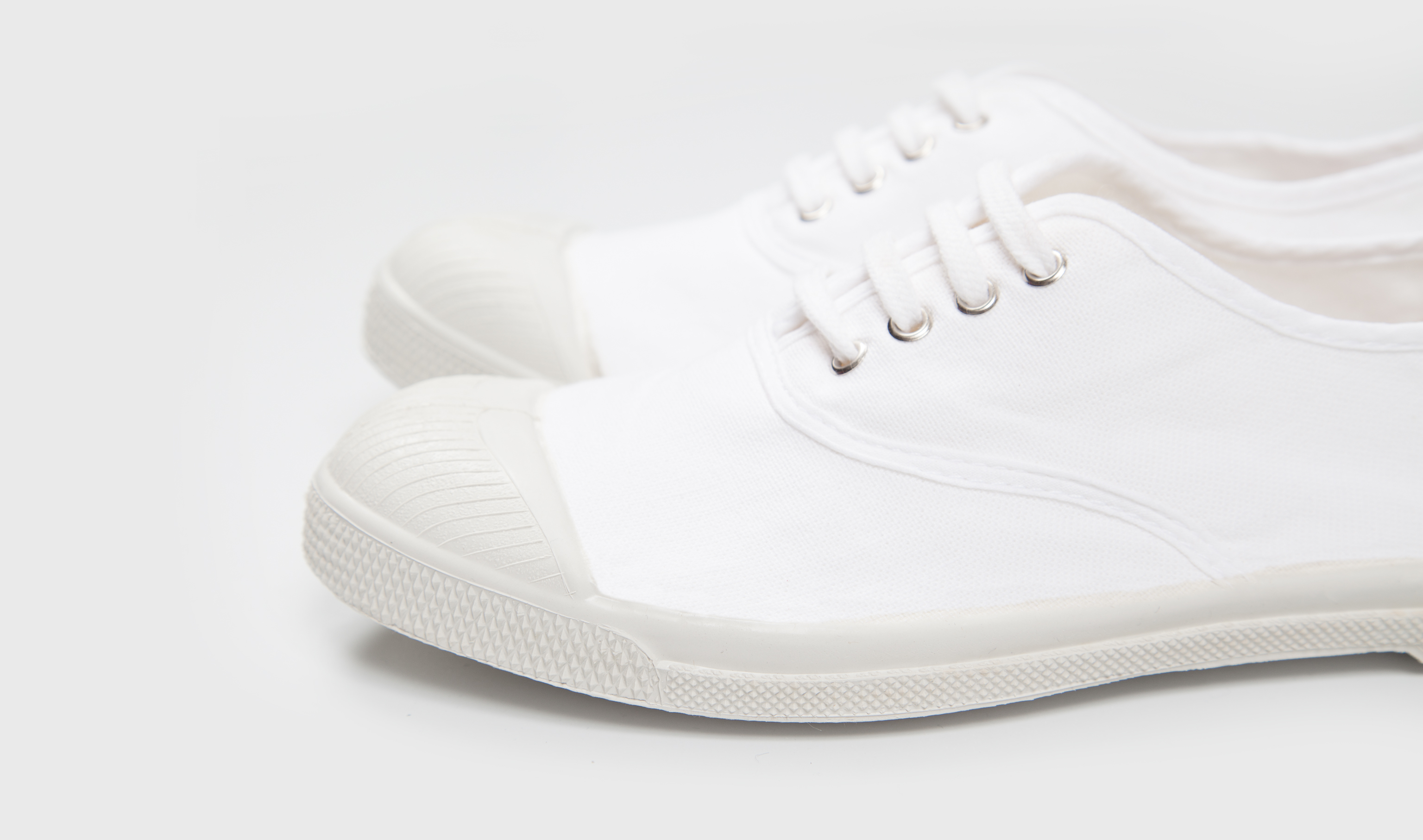 La tennis blanche